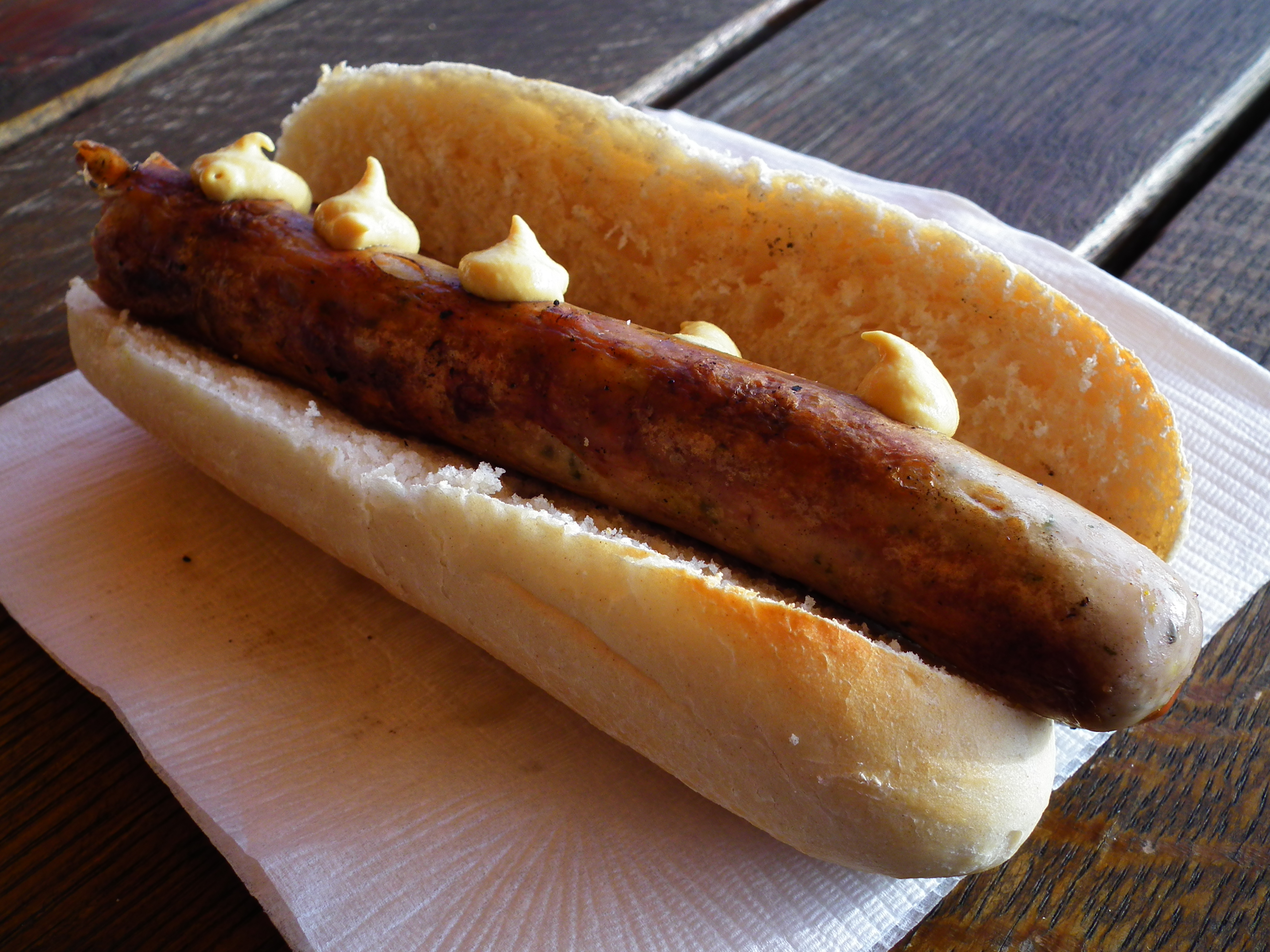 Thüringer Rostbratwurst mit Brötchen und Senf